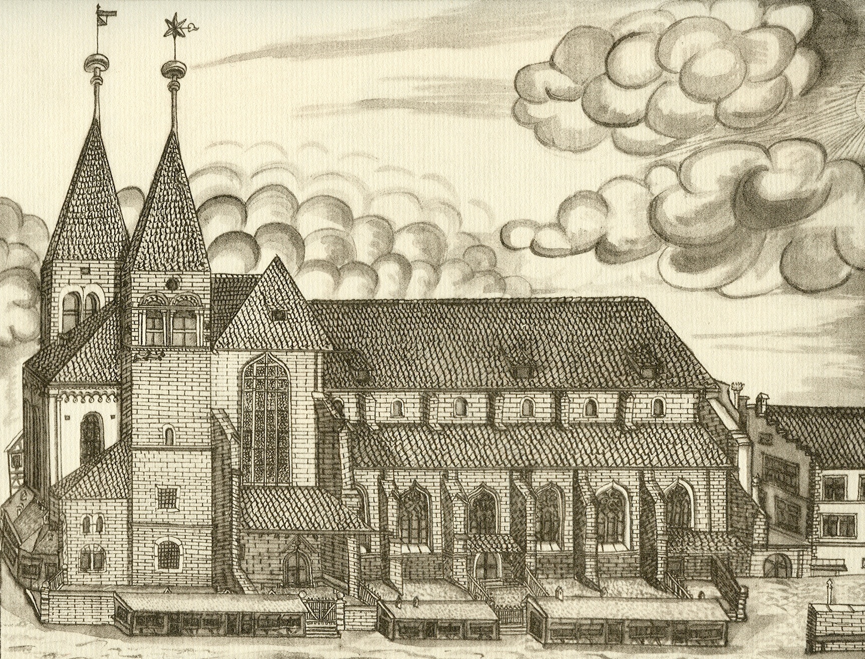 Das Fraumünster um 1700, Zürich, Schweiz